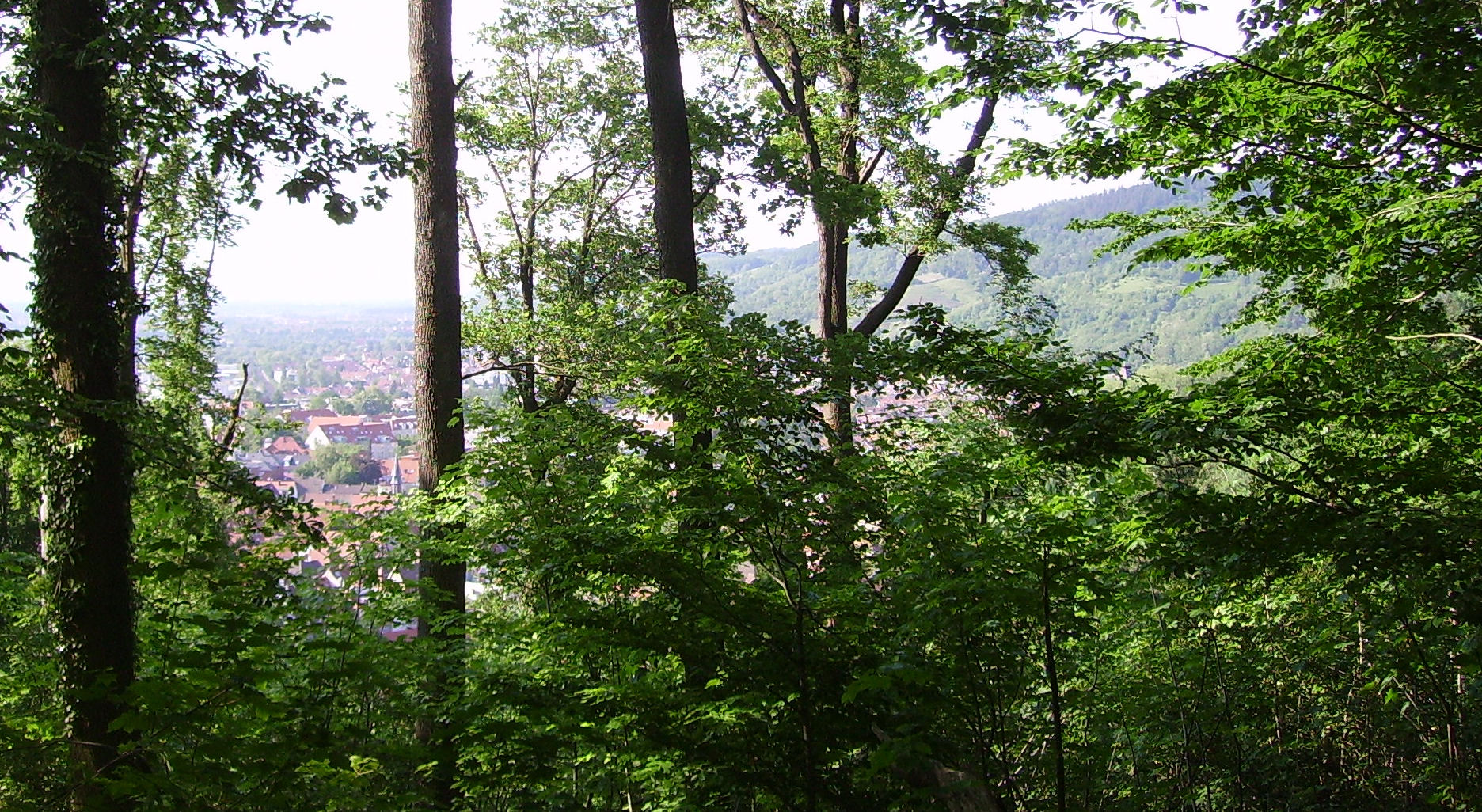 view of Weinheim, Germany